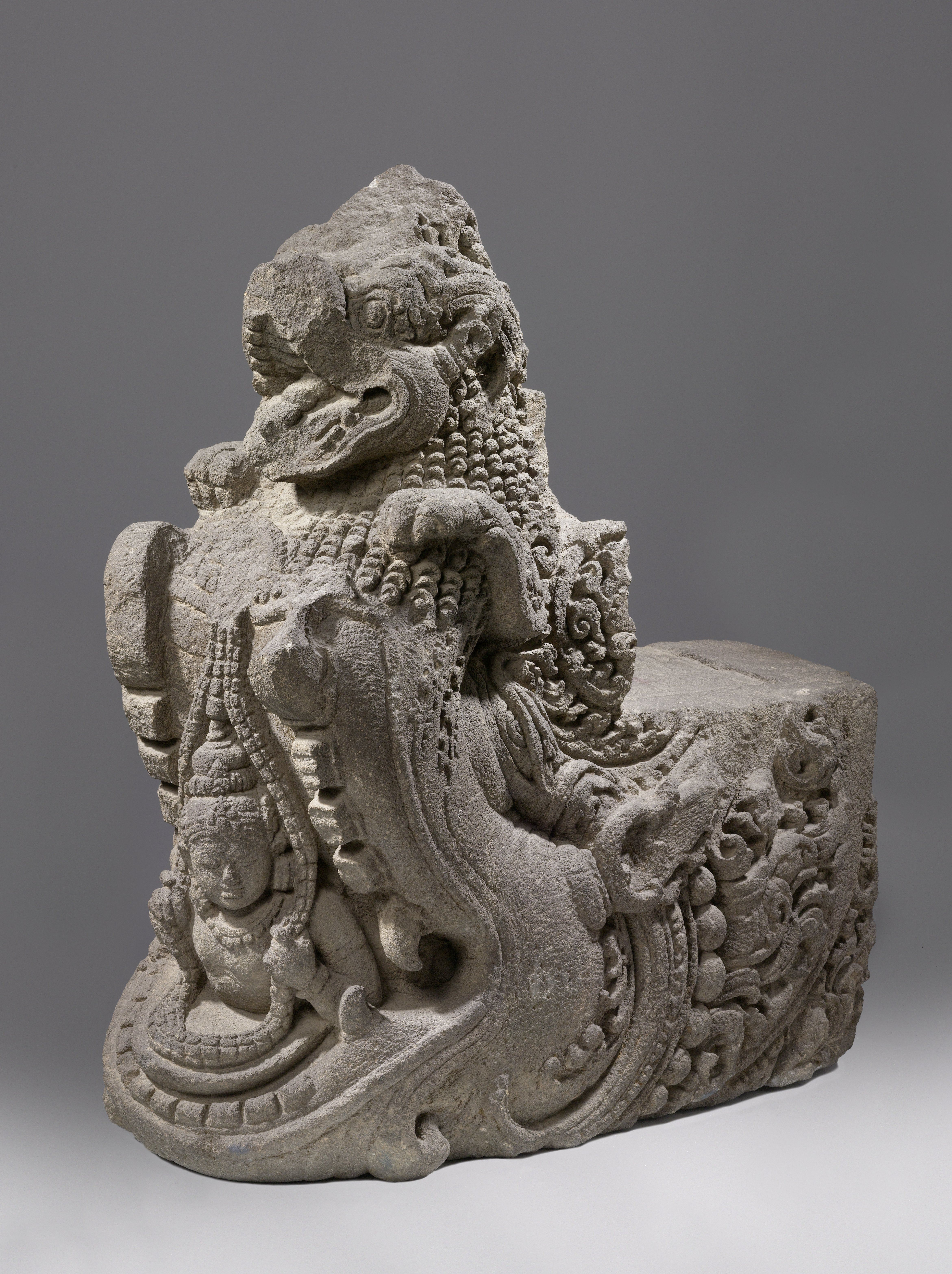 IdentificatieTitel(s): MakaraMakara met een romp in de vorm van een leeuwObjecttype: beeldhouwwerk Objectnummer: AK-MAK-248Omschrijving: Makara afkomstig van de linker ingang van Candi Bubrah, een tempel ten zuiden van het Candi Sewu-complex op Midden-Java. De bovenkaak eindigt in een gehoornd monster met opengesperde muil waaruit een menselijk wezen tevoorschijn komt.VervaardigingVervaardiger: beeldhouwer: anoniemPlaats vervaardiging: Candi BubrahDatering: ca. 800 - ca. 900Fysieke kenmerken: vulkanisch gesteente (andesiet)Materiaal: andesiet Afmetingen: h 95 cm × b 89 cm × d 37 cm × g 306,5 kgVerwerving en rechtenCredit line: Bruikleen van de Vereniging van Vrienden der Aziatische Kunst (overdracht Oudheidkundige Dienst Nederlands-Indië, 1930)Verwerving: bruikleen 1972Copyright: Publiek domeinHerkomst: …; collection Aerchaeological Service of the Dutch East Indies; acquired by the Vereniging van Vrienden der Aziatische Kunst, 1930; {Southworth 2017} from whom on loan to the museum, 1972’.